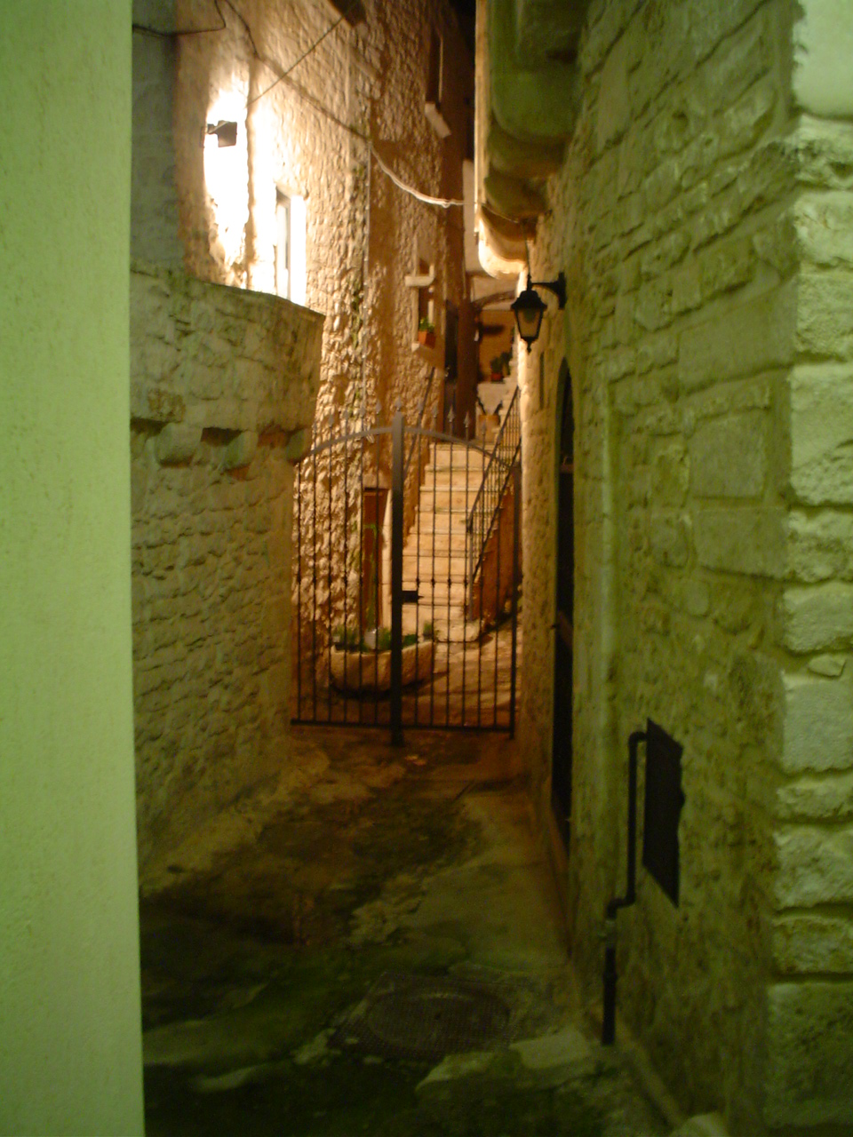 foto non professionali e assolutamente di pubblico dominio da me fatte in data 01/01/06